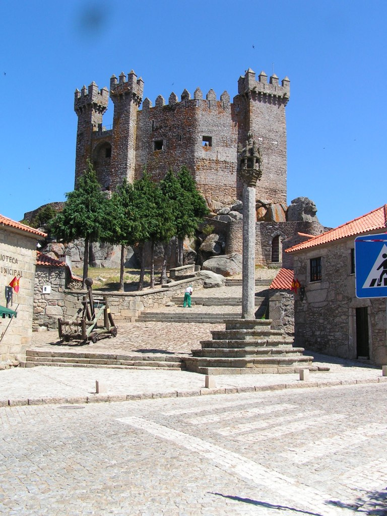 Aqui já se vê melhor que a catapulta aponta para os portões :)